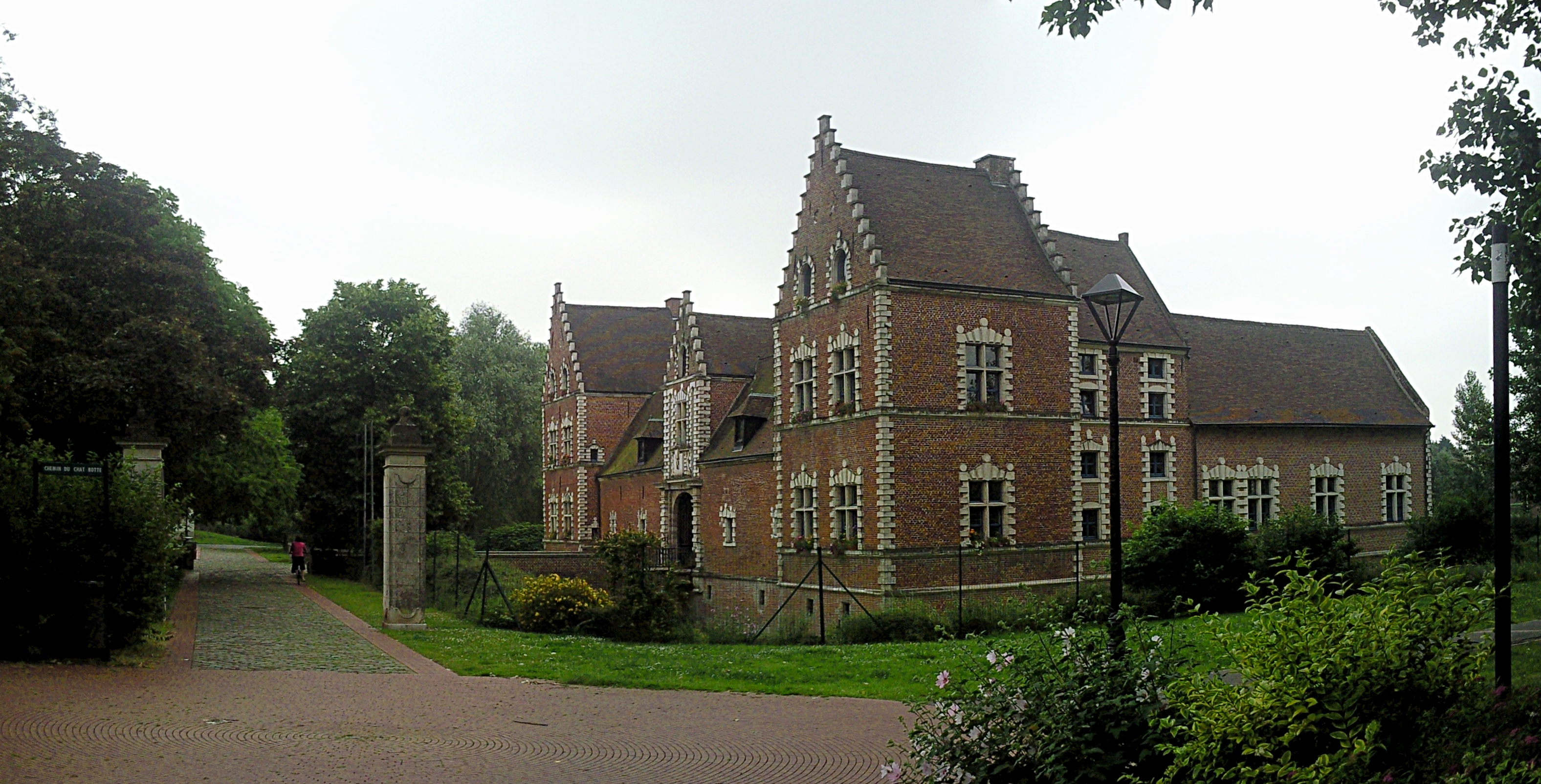 Le château de Flers, datant du XVIIème siècle, à Villeneuve-d'Ascq (Nord).